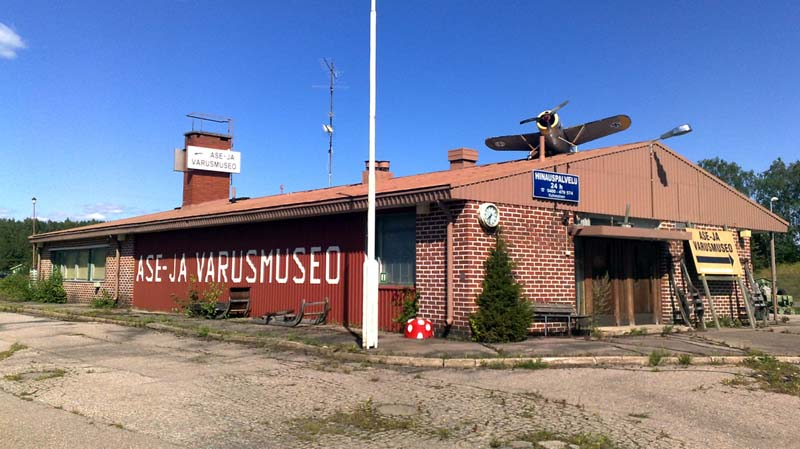 Kuhmoisten ase- ja varusmuseo